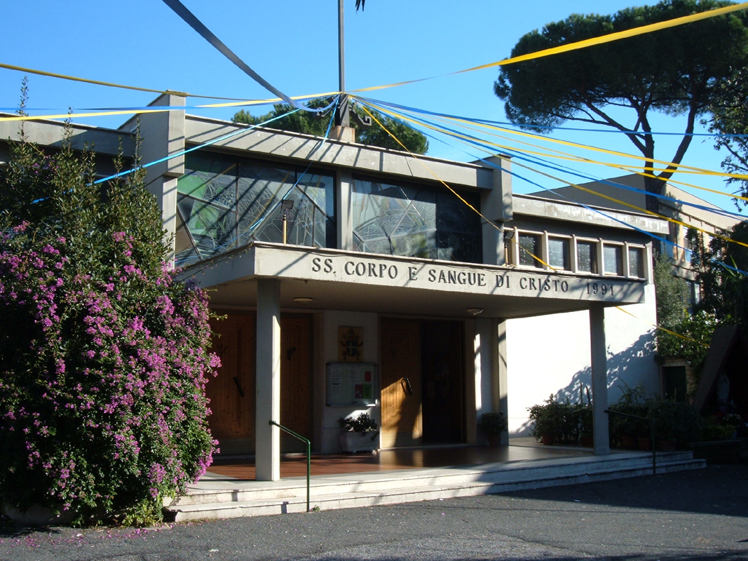 Chiesa del Santissimo Corpo e Sangue di Cristo, a Roma, nel quartiere Tuscolano.